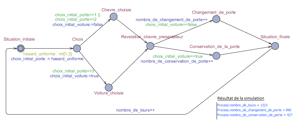 On suppose que le joueur a gagné et on se demande s'il a changé de porte ou non. Après 1323 tours de jeu (itérations de la simulation), en supposant que le joueur a gagné à chaque fois, on trouve que la probabilité que le joueur ait changé de porte est de 67,72% (nombre_de_changements_de_porte/nombre_de_tours) et que la probabilité que le joueur ait conservé sa porte est de 32,28% (nombre_de_conservations_de_porte/nombre_de_tours). Le logiciel Uppaal a été utilisé pour réaliser cette simulation de Monte-Carlo. En rouge sont les noms des différents états du système associés à des noeuds. On trouve associés aux flèches, autrement dit aux transitions : -en bleu les affectations de valeurs, -en vert les gardes logiques, -en jaune les affectations de variables non-déterministes. On a défini arbitrairement que les portes 1 et 2 cachaient une chèvre et que la porte 3 cachait une voiture. Cela n'a cependant pas d'importance car une permutation entre les numéros de porte n'a pas d'influence sur le résultat de la simulation.